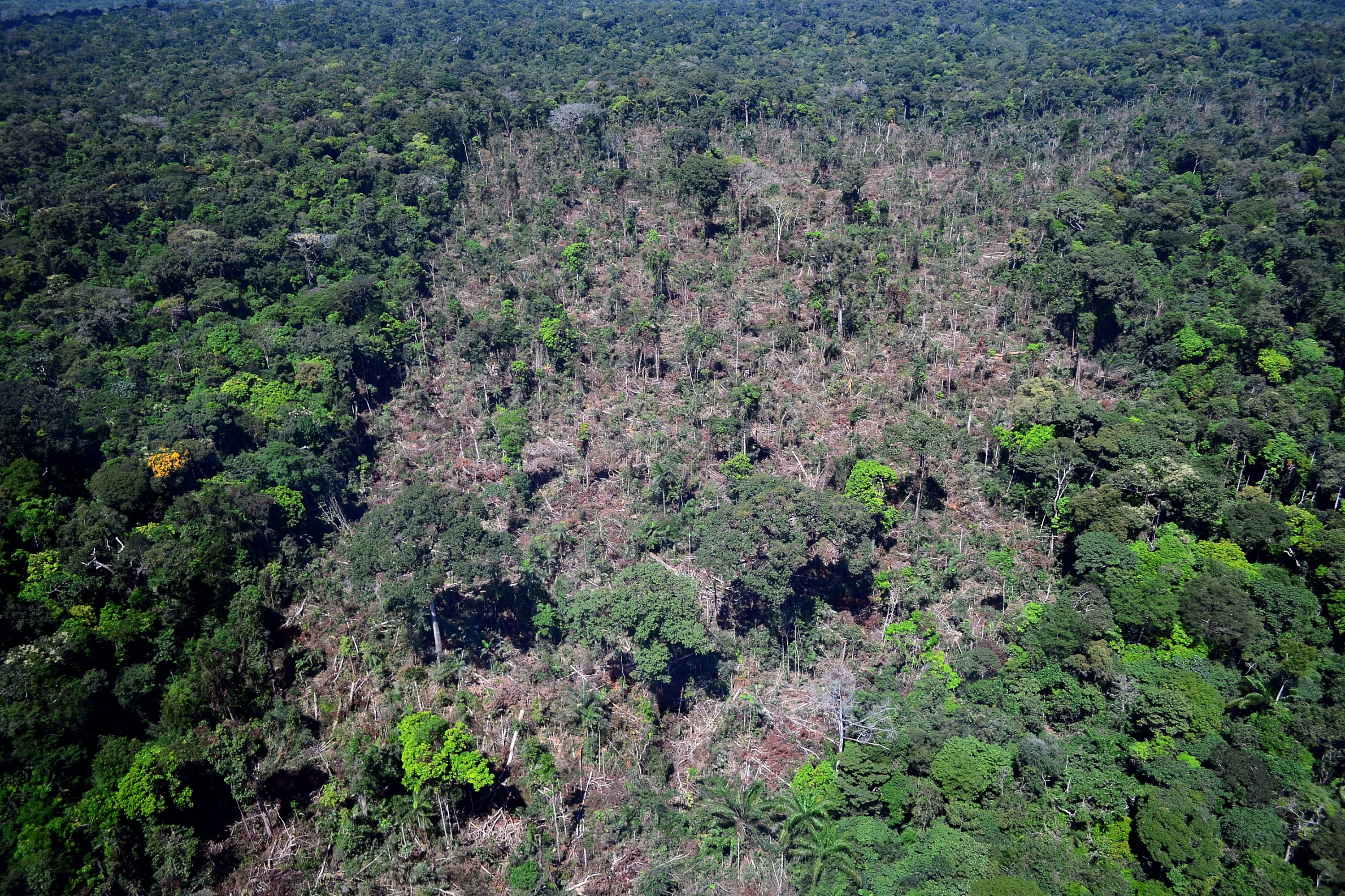 Árvores derrubadas em área de exploração ilegal de madeira em Novo Progresso, Pará. Foto: Vinícius Mendonça - Ascom/Ibama.